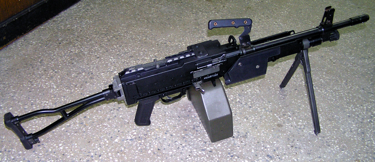 5,56 mm kbkm wz.2003D